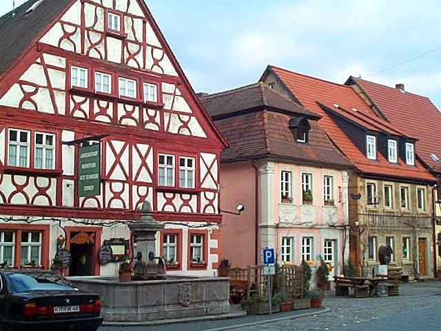 Bildbeschreibung: Das Gasthaus "Zur Schmiede" am Karlsplatz Quelle: selbst fotografiert Fotograf/Zeichner: M. Karl aka "Umpf Datum: 2003